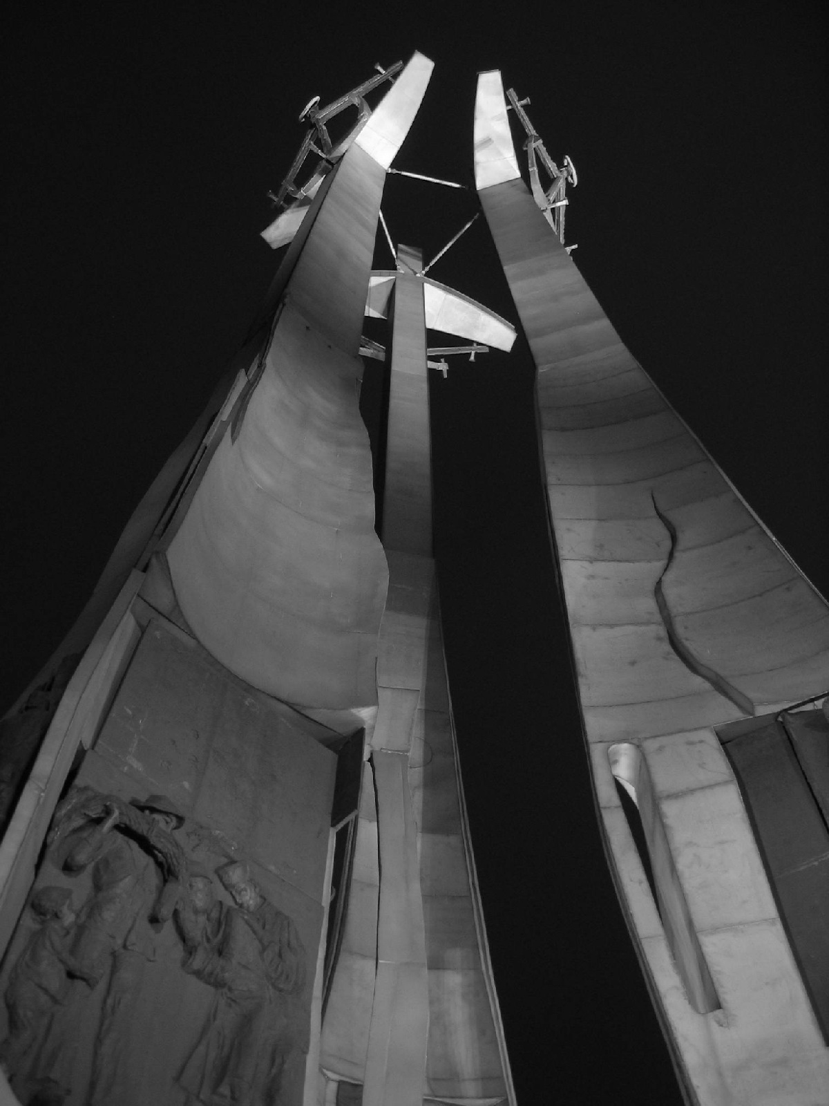 Pomnik Ofiar Grudnia 1970 w Gdańsku na Placu Poległych Stoczniowców Author:Piotr Tysarczyk